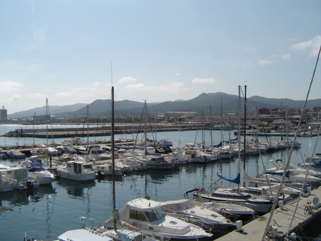 Puerto de Mataró, Barcelona. Fotografía tomada por Georgina Cabrera